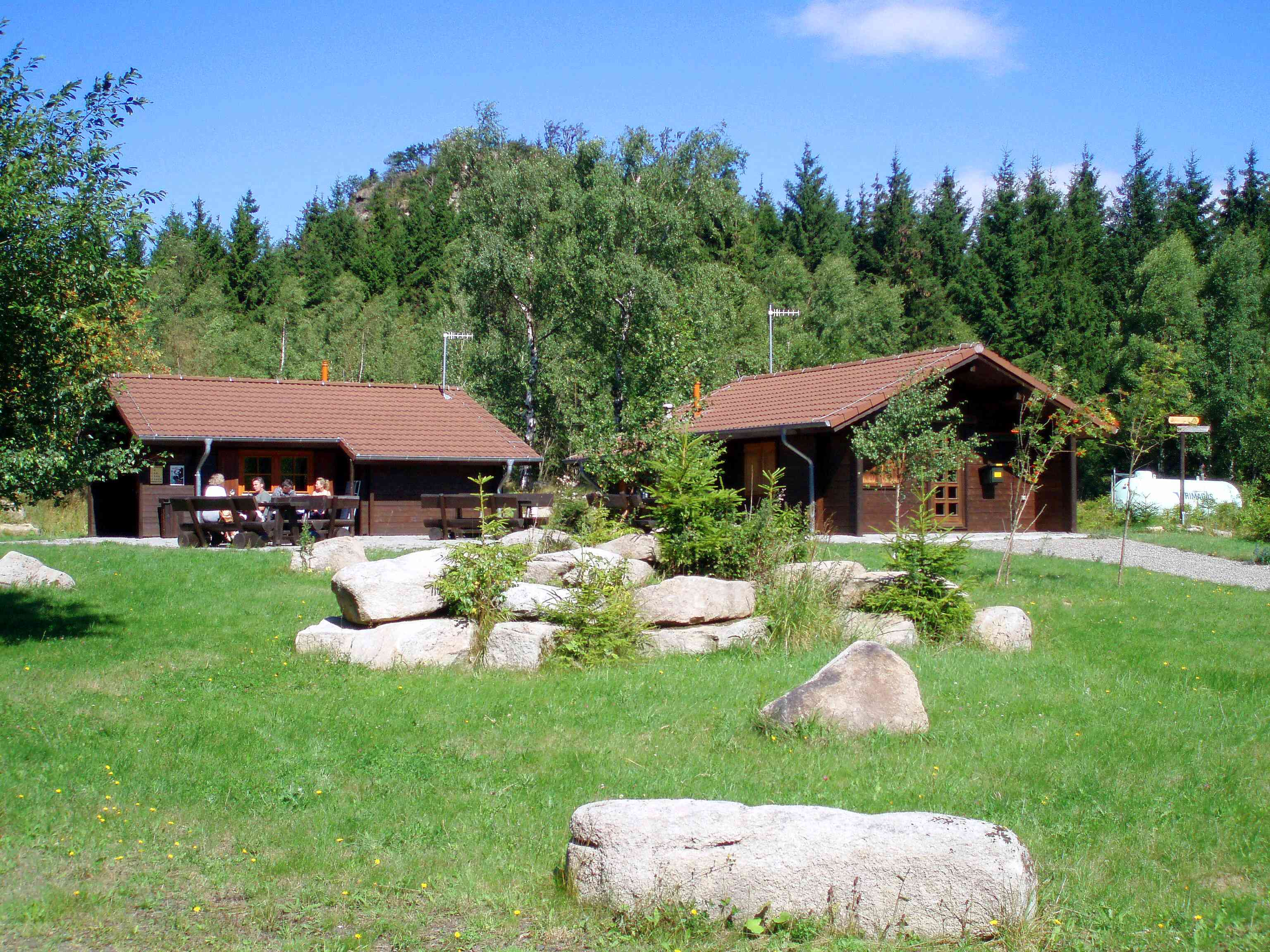 Rangerstation Scharfenstein, Blick aus Richtung der Rangerstation zum Scharfenstein mit Scharfensteinklippe